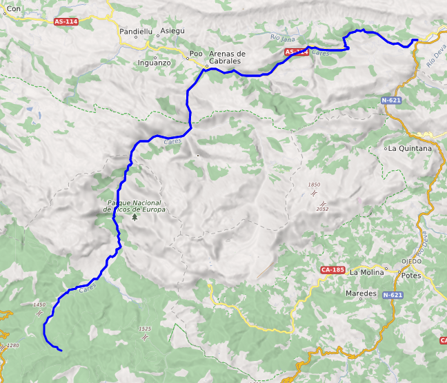 carte réalisée sur umap This map may be incomplete, and may contain errors. Don't rely solely on it for navigation.